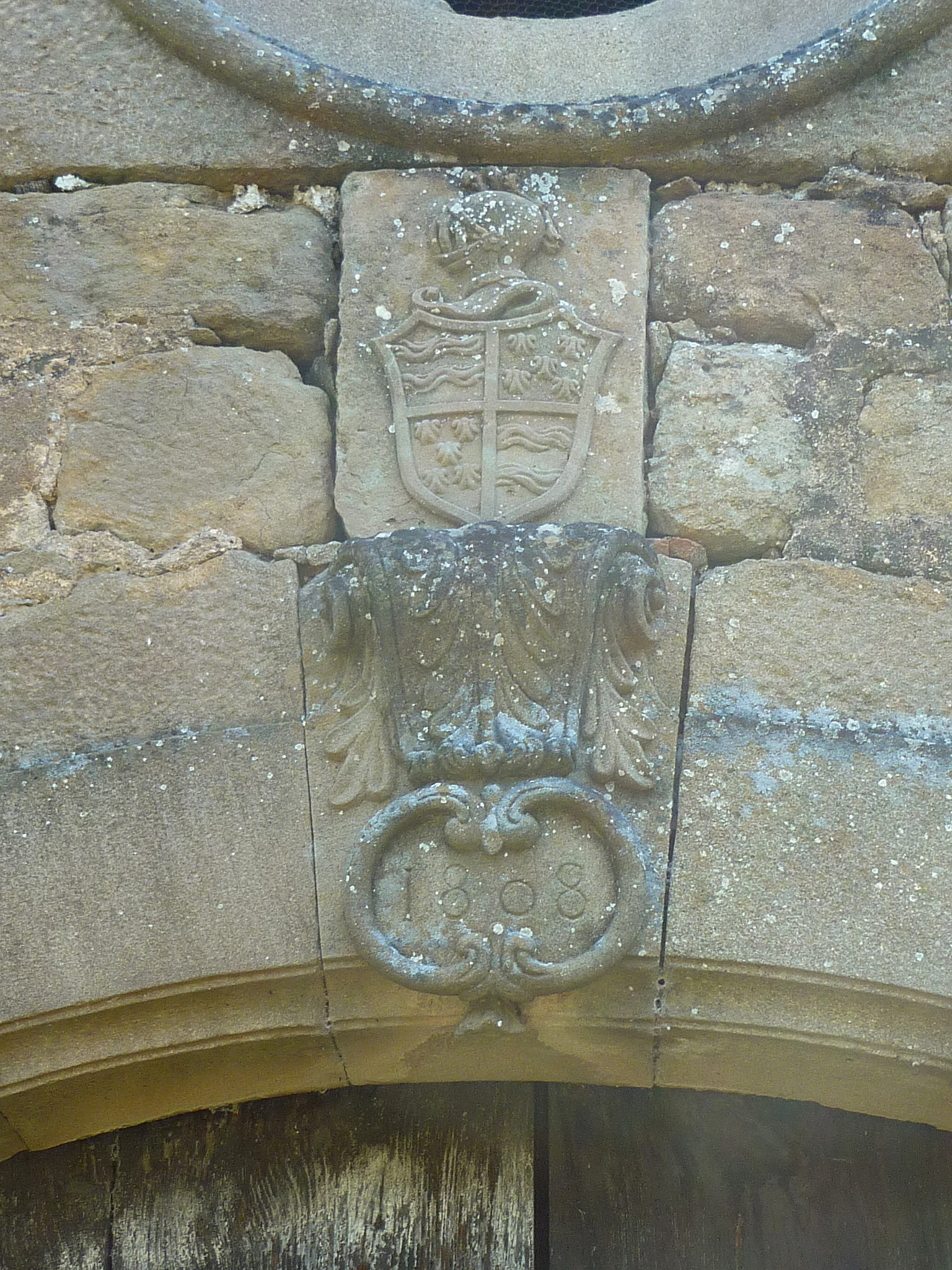 Ermita de Sant Miquel del Mas d'en Forn (Biosca): escut damunt la porta